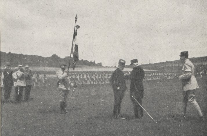 Le Général De CASTELNAU, commandant le G. A. C. remet au Général CARBILLET, commandant la 29' D. I., la plaque de Leglon d'Honneur (29 Juillet 1915).